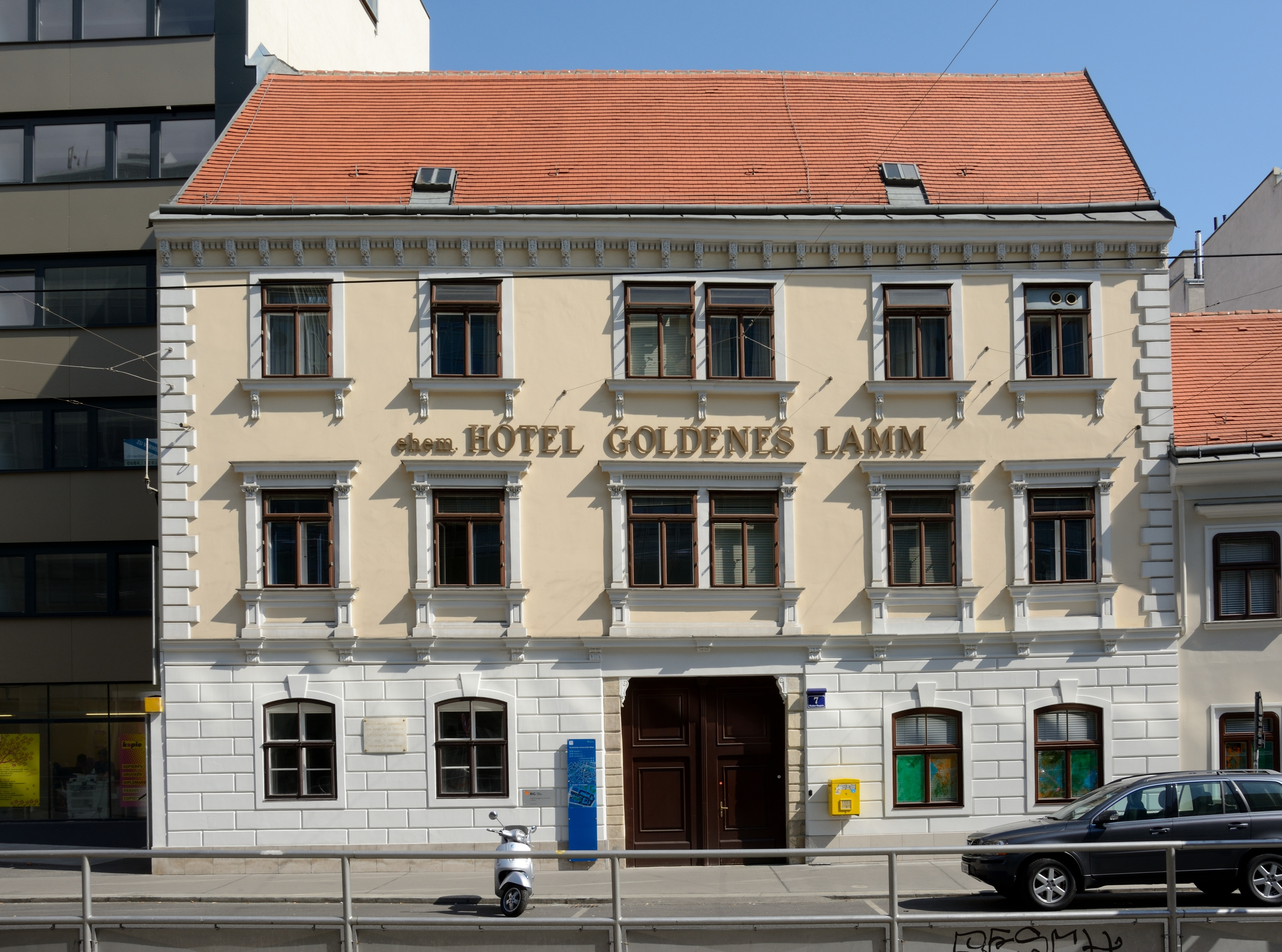 Ehemaliges Hotel Goldenes Lamm (Bild zeigt den Zustand nach Rückbau des "Weltladens")